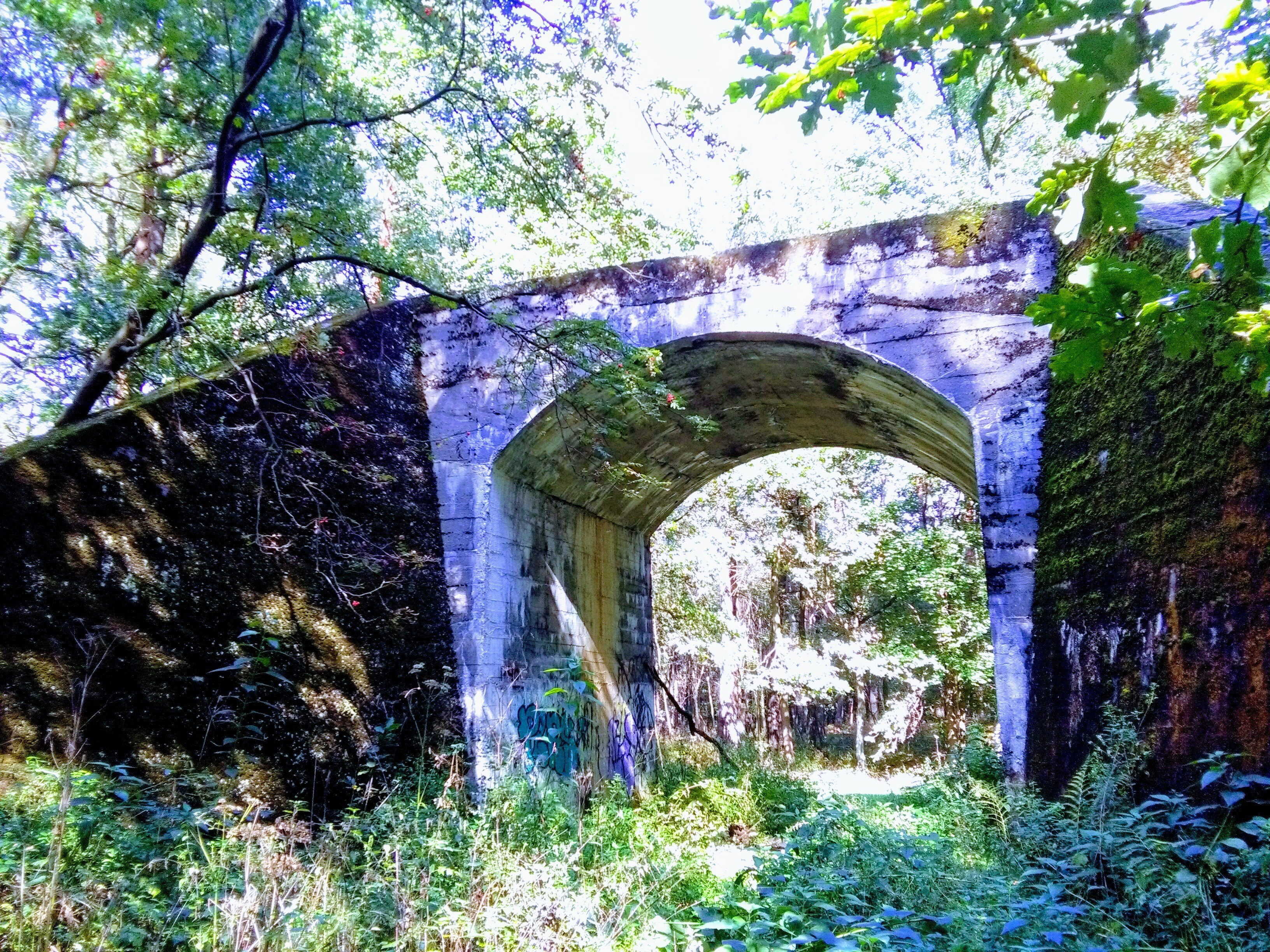 Most Cygański w lesie Gniotek w Katowicach Podlesiu